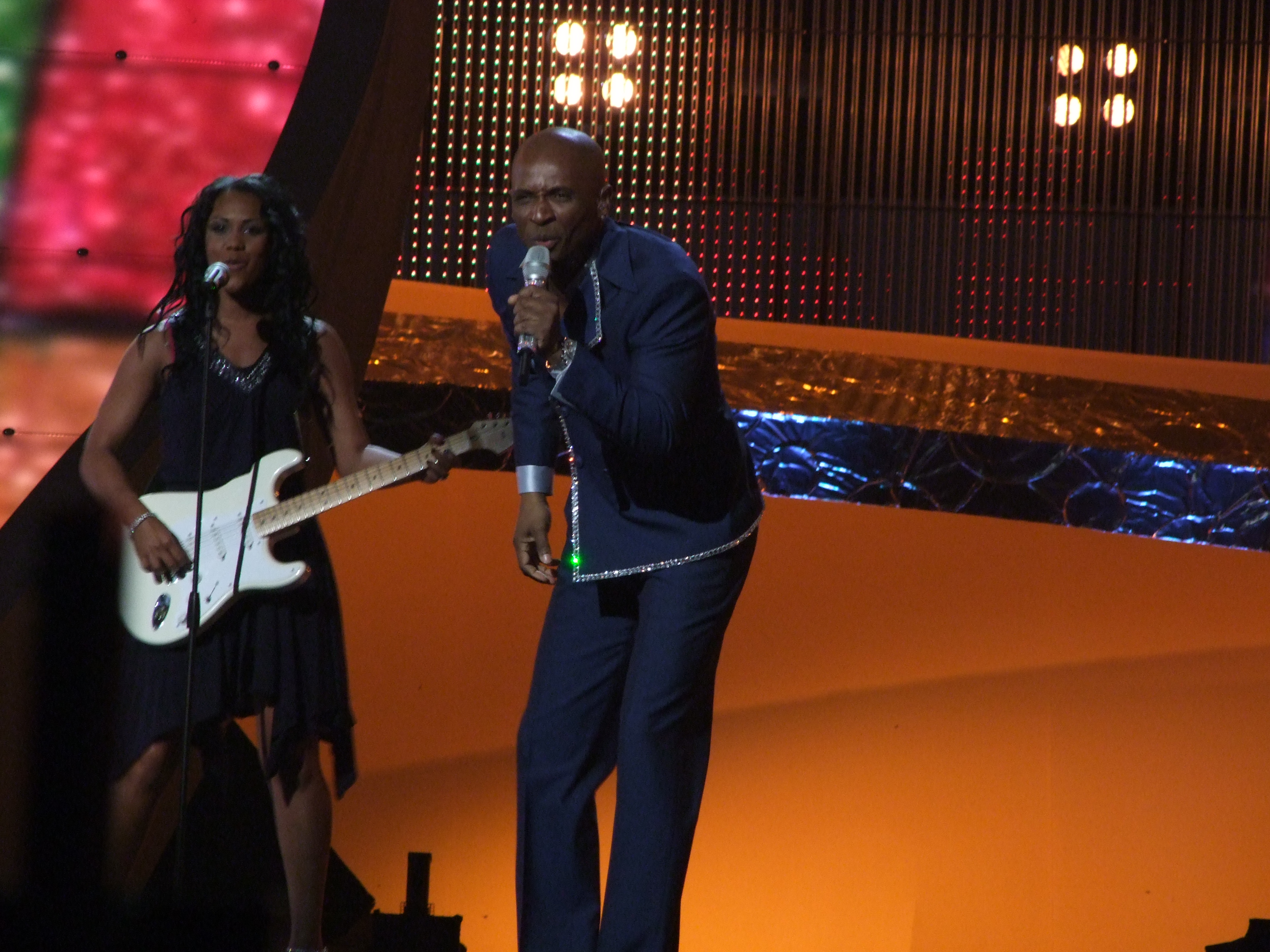 Final Eurovision 2008